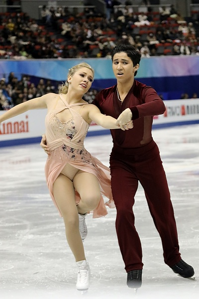 Марджори Ладжои / Захари Лага (Канада) на финале юниорского Гран-при 2017-2018